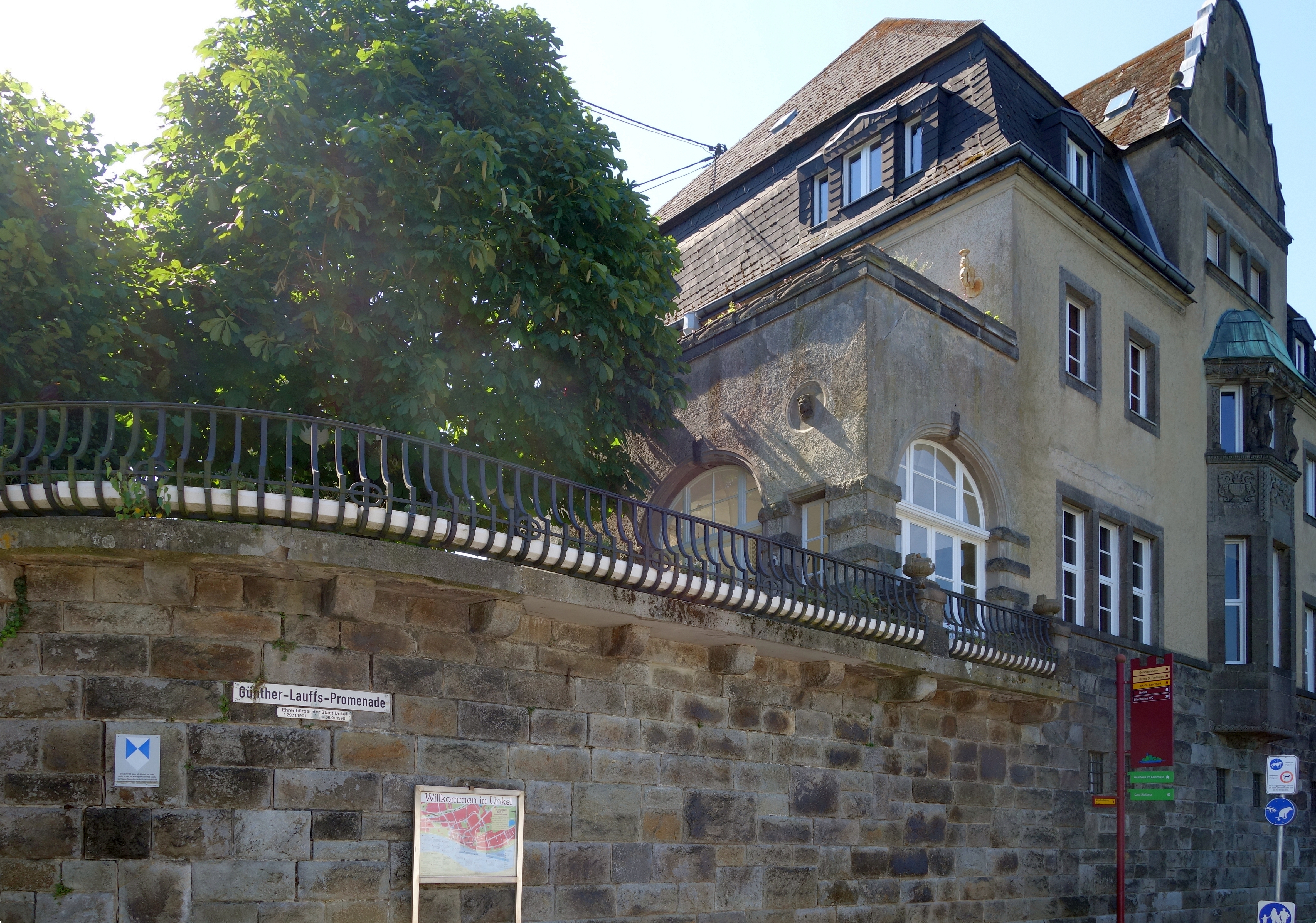 In Unkel, Rheinland-Pfalz, 30. Juni 2018. Villa Profitlich, Profitlich & Söhne, Rauchwarenveredlung